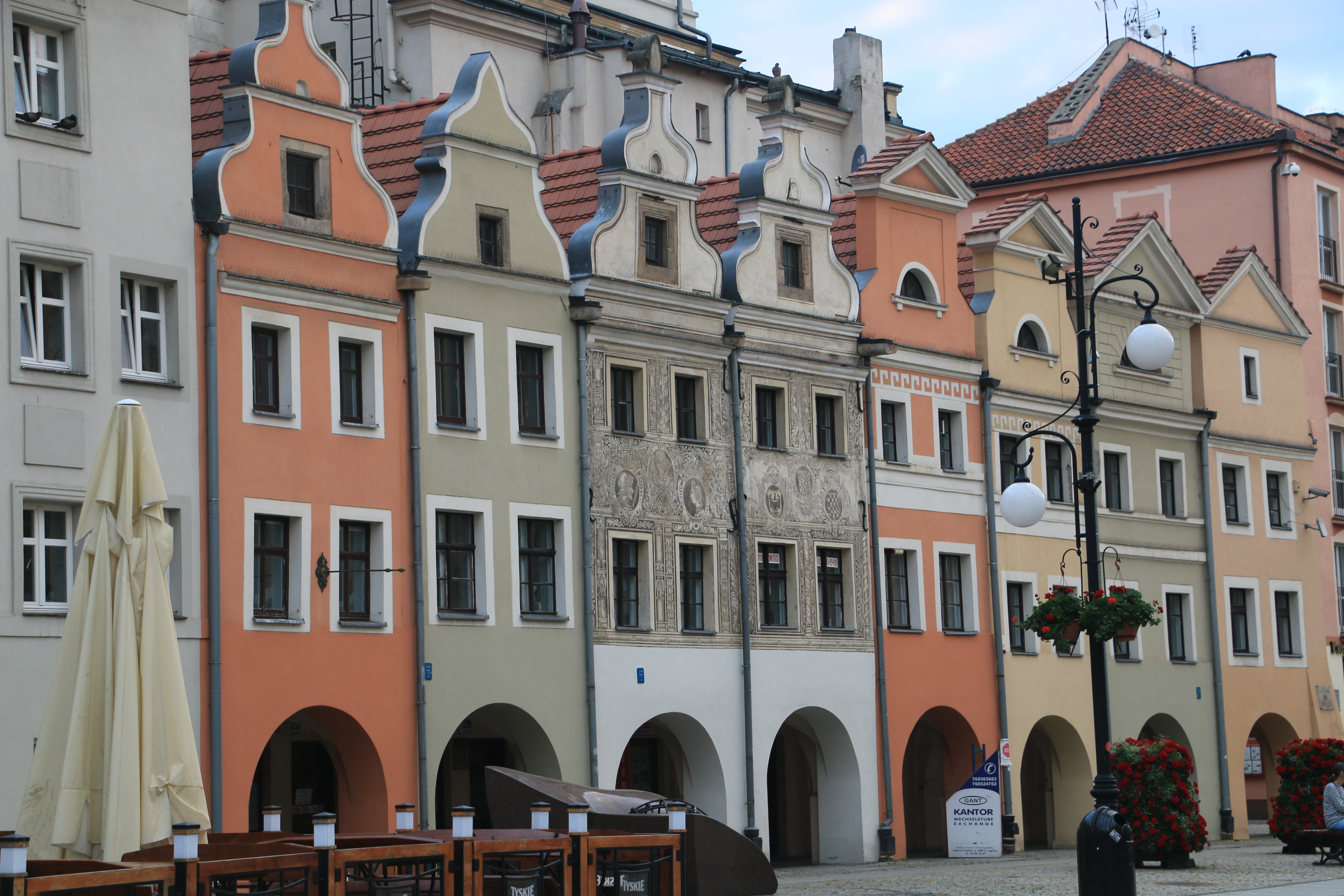 Legnica, Poland